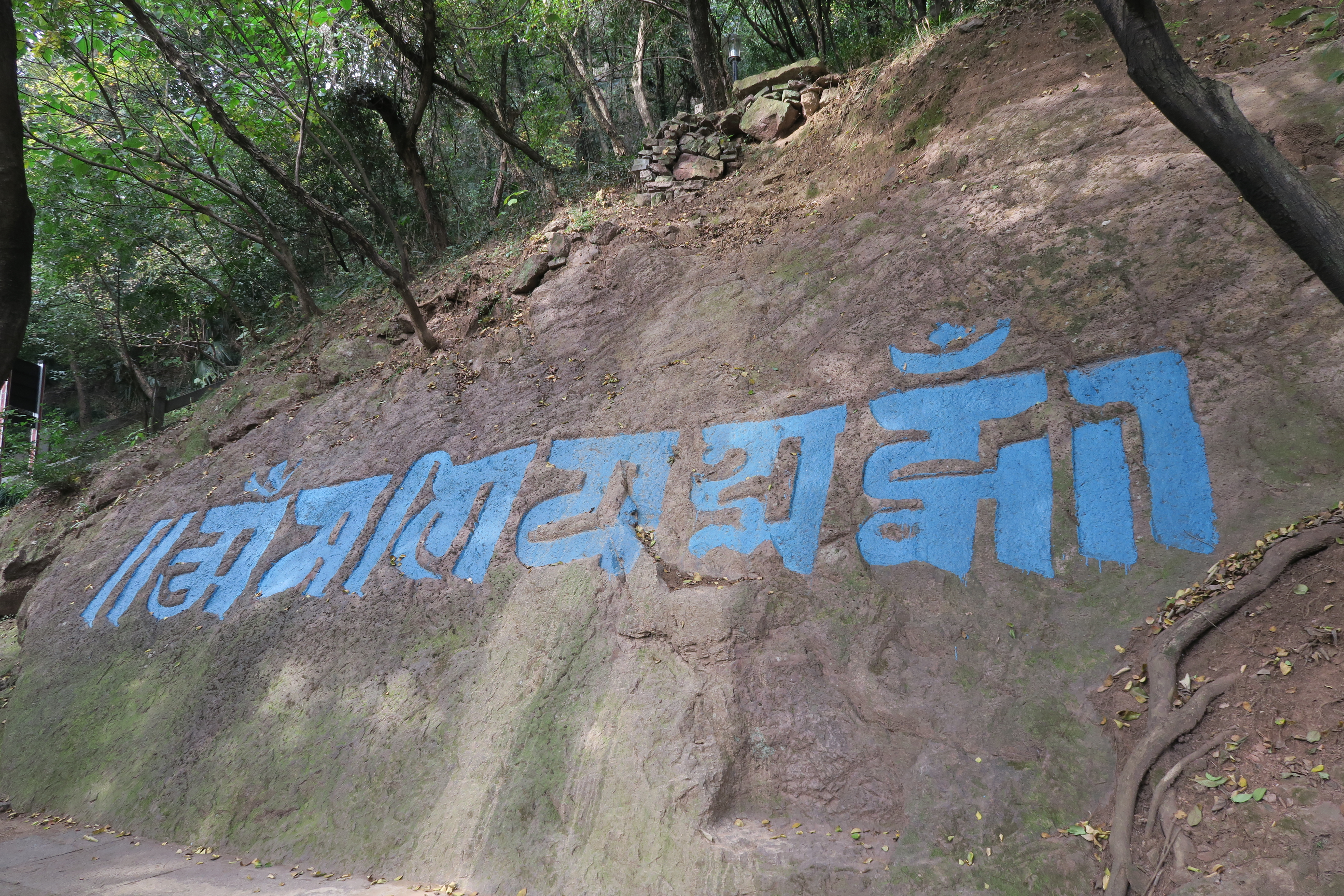 招宝山南坡摩崖石刻梵文六字真言